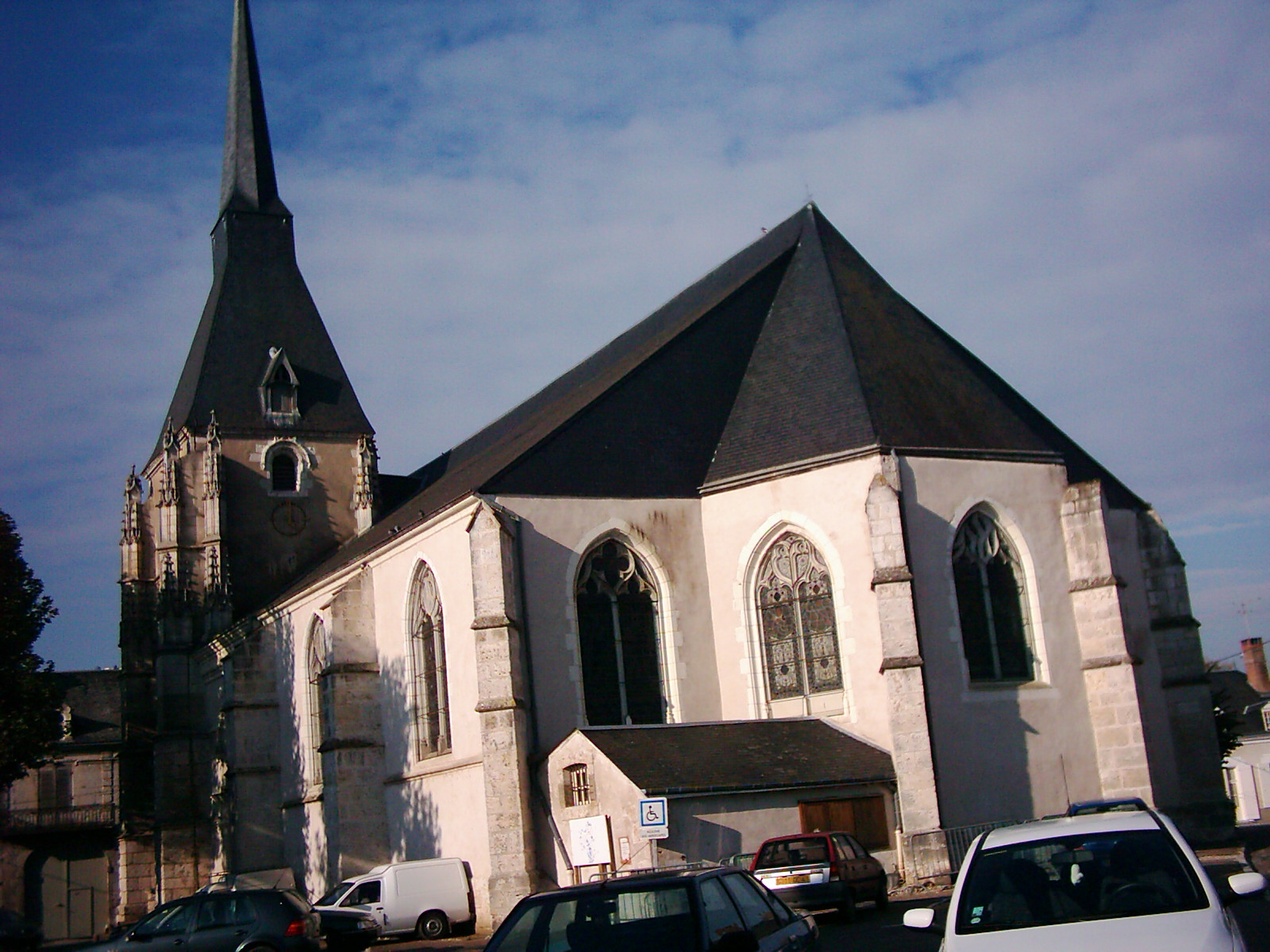 depuis la place du marché, le chevet de l'église paroissiale